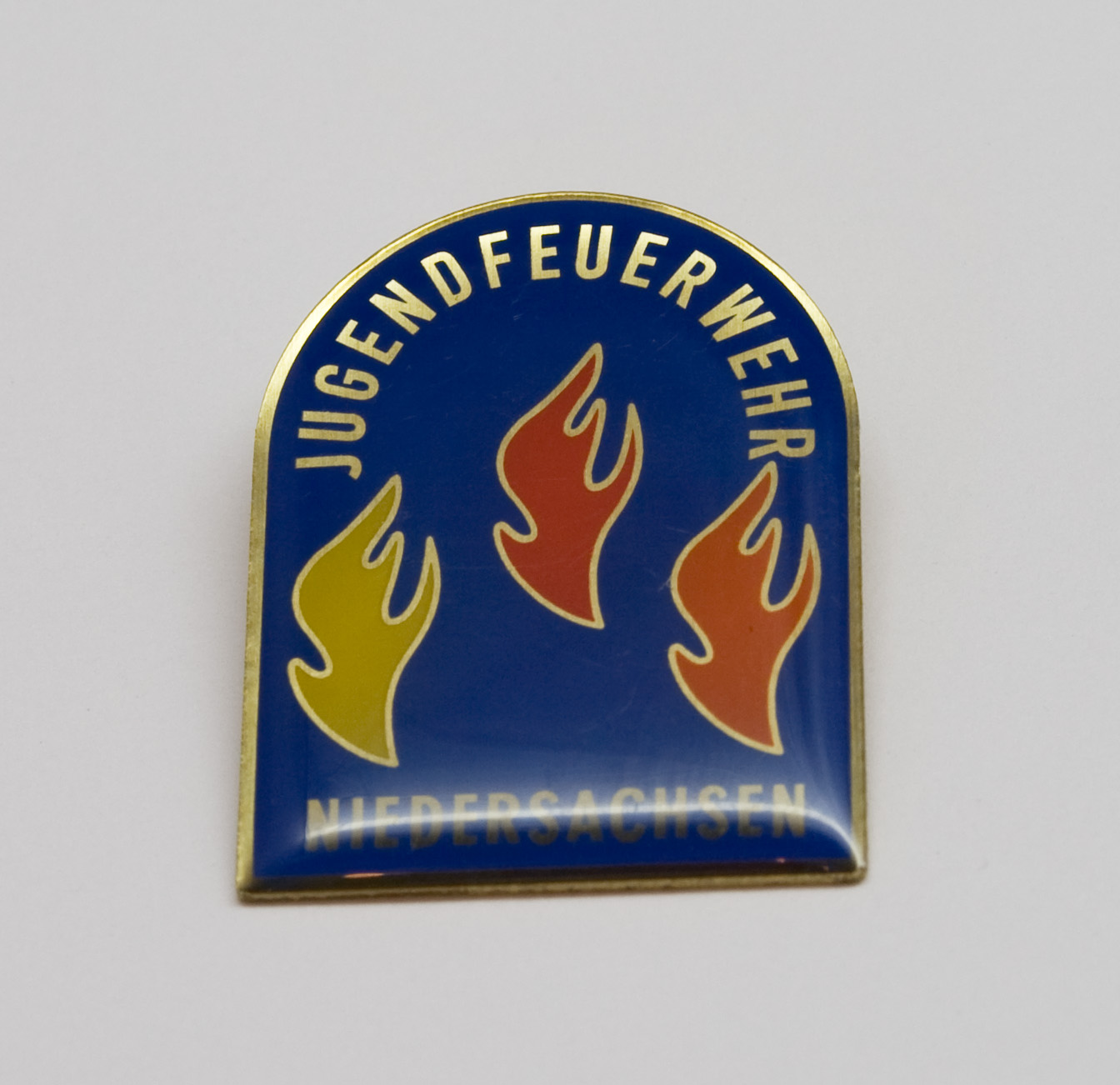 Jugenflamme Stufe3 aus Niedersachsen